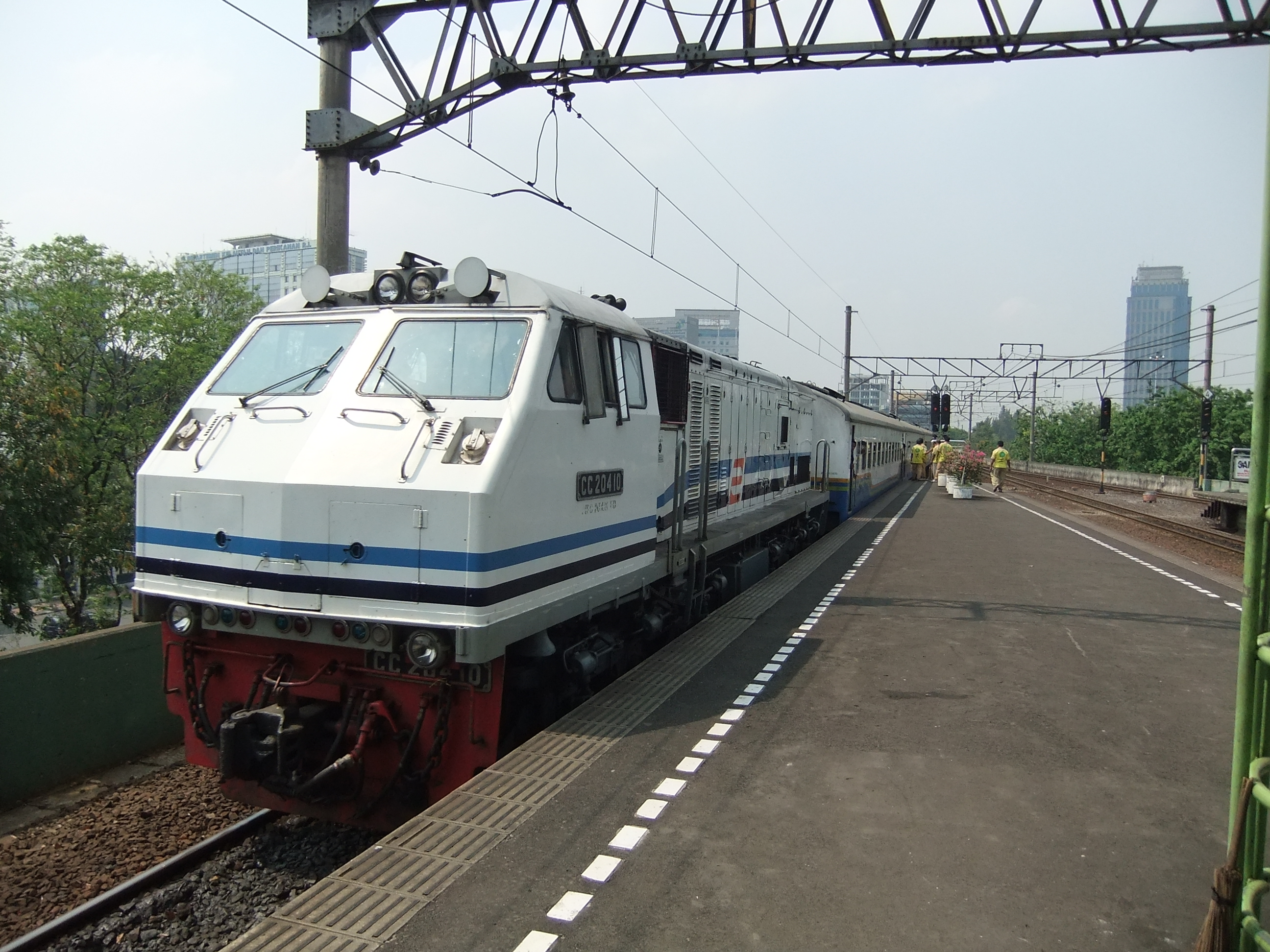 Lokomotif CC 20410, Stasiun Gambir